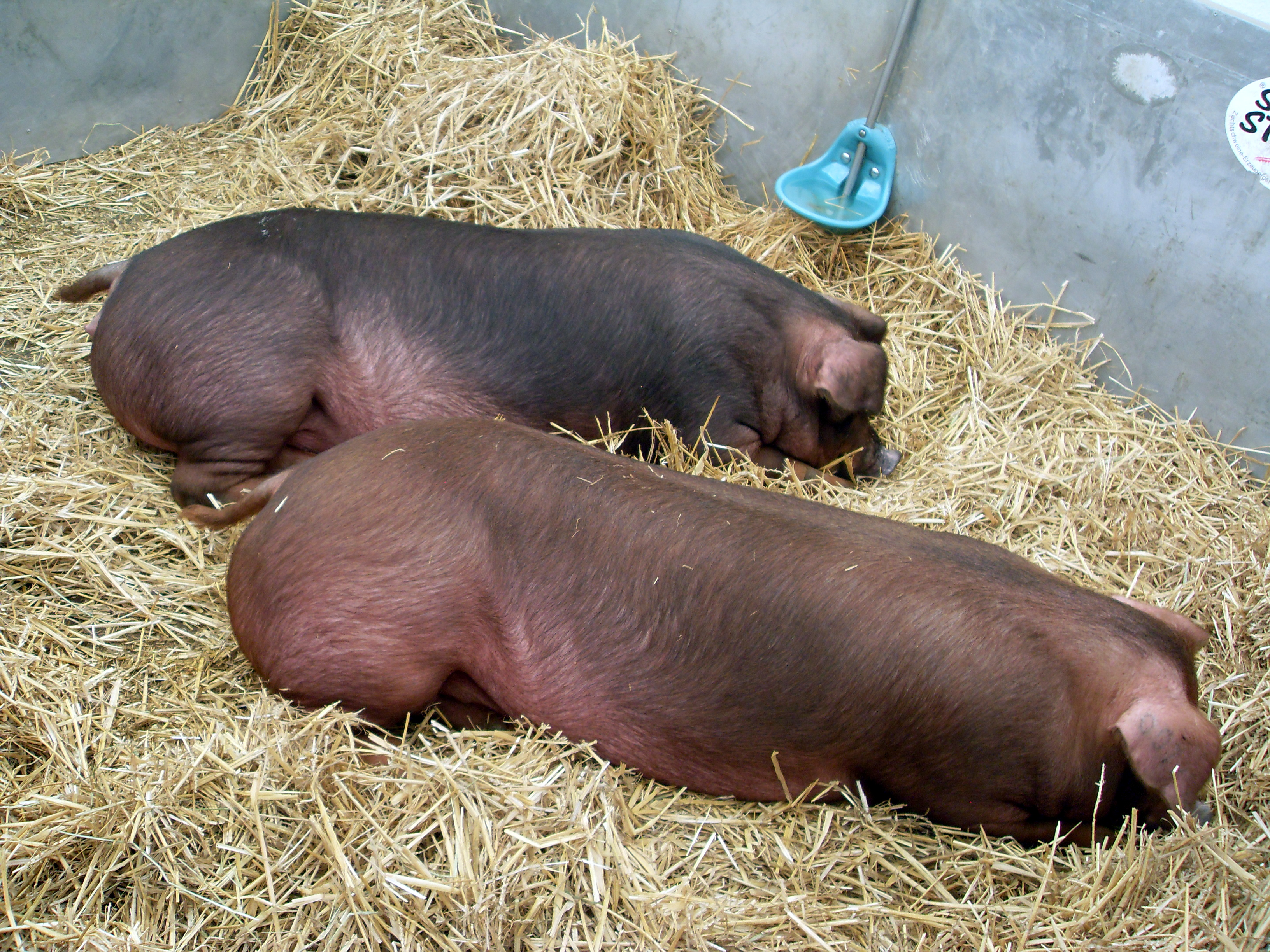 Duroc-Schwein